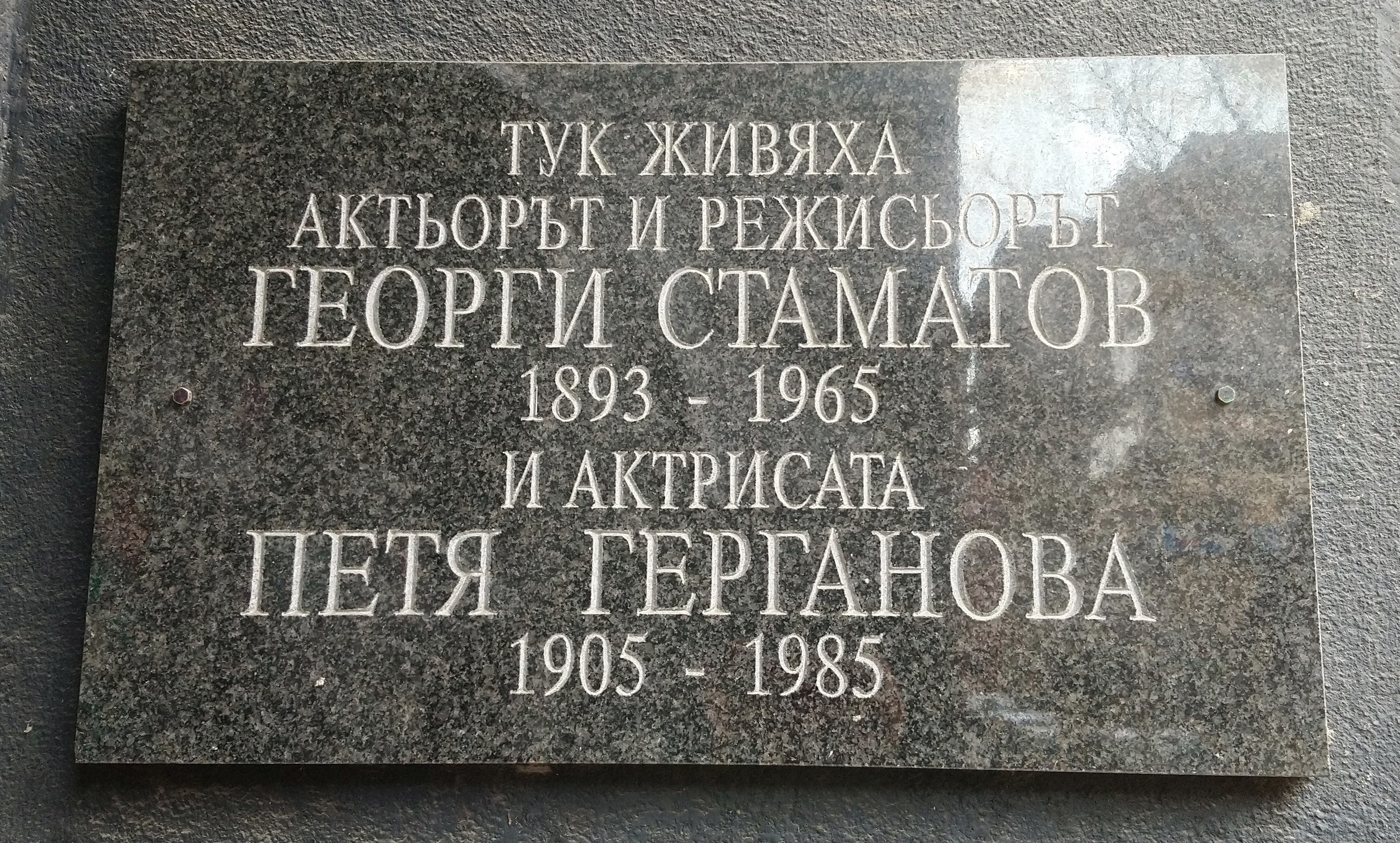 Паметна плоча на актьора Георги А. Стаматов и актрисата Петя Герганова, ул. Неофит Рилски 55а, София